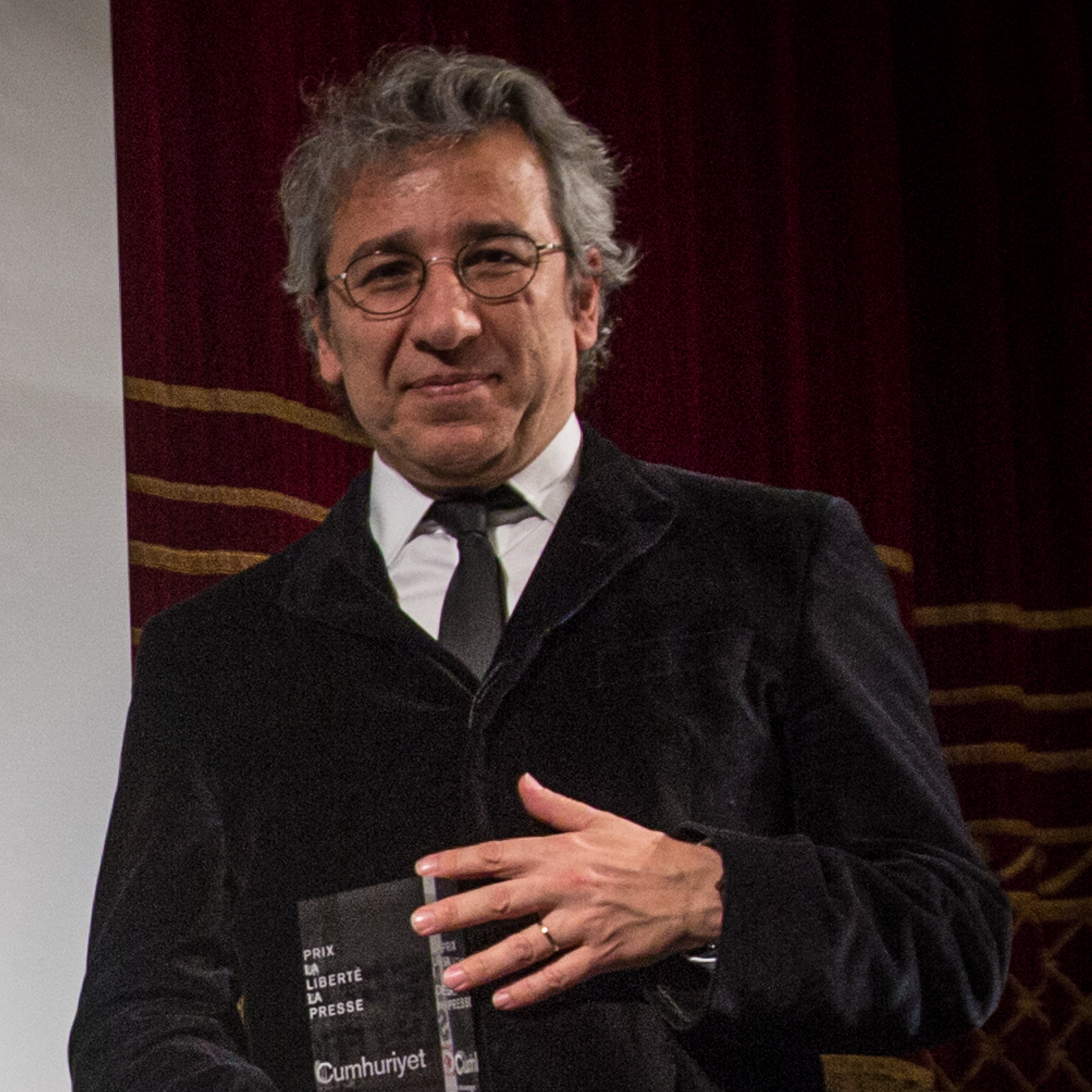 Can Dündar